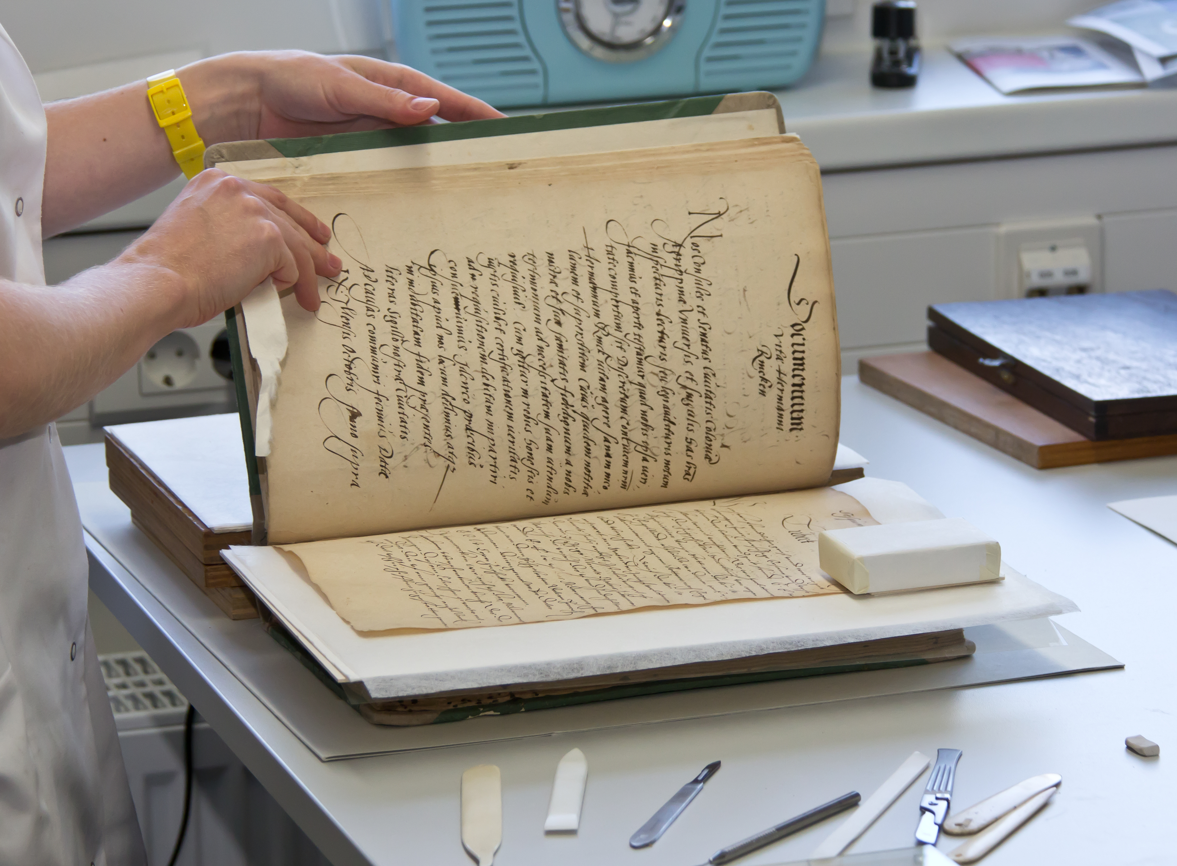 Pressetermin zur Inbetriebnahme der Gefriertrocknungsanlage im Restaurierungs- und Digitalisierungszentrum des Historischen Archiv der Stadt Köln. Restaurierung eines gefriergetrockneten Buches.